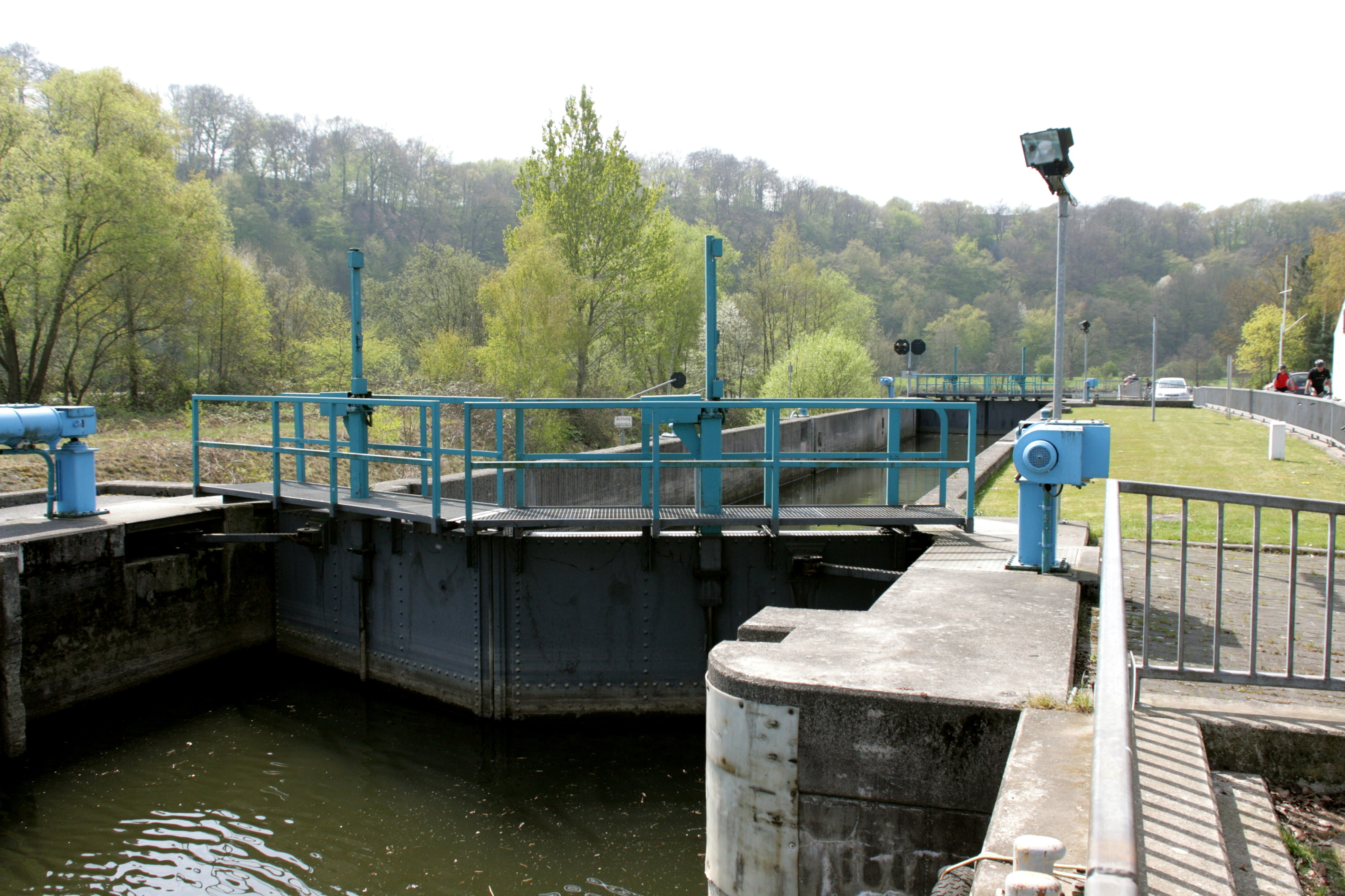 Herbeder Schleuse der Ruhr in Witten-Herbede